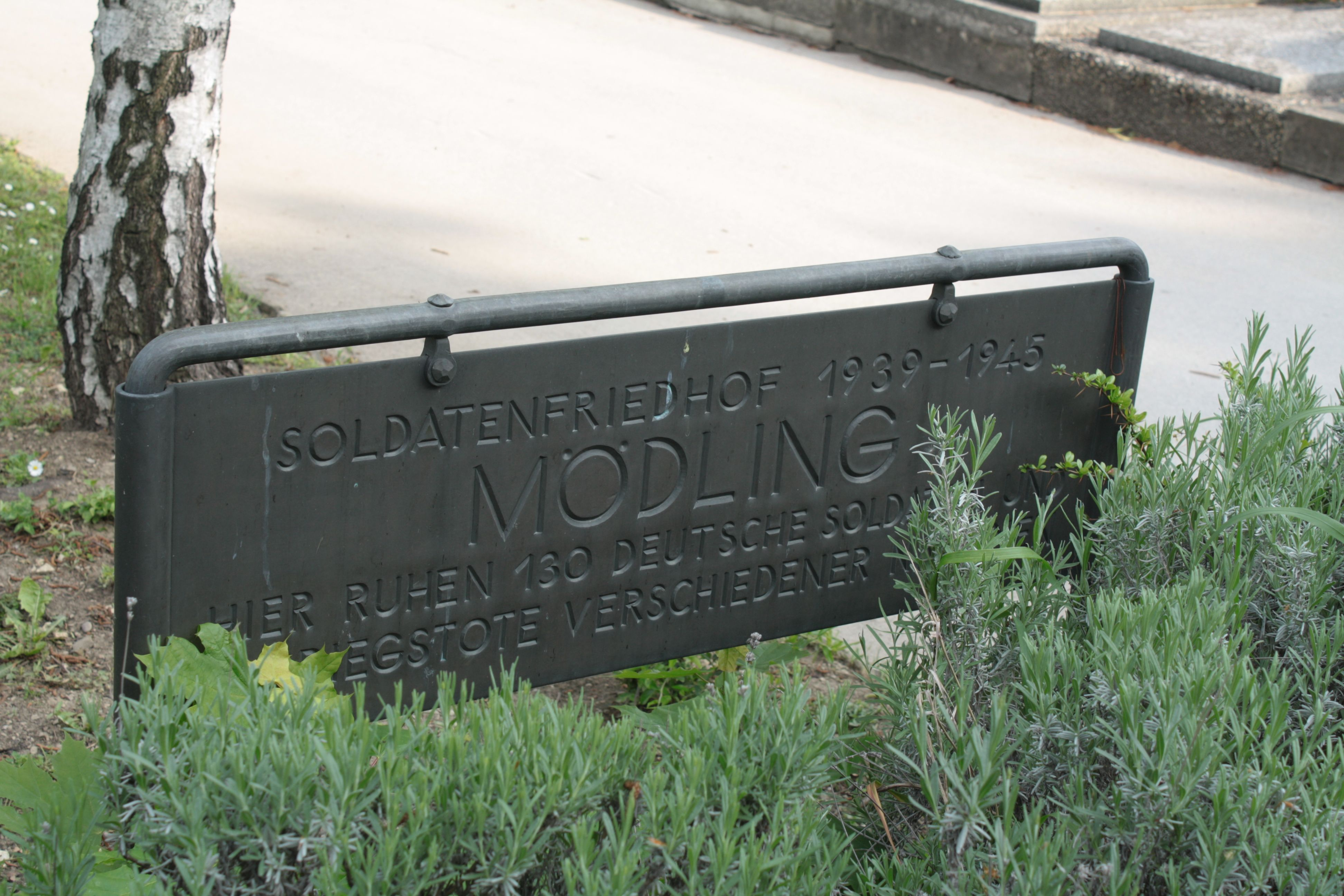 Soldatenfriedhof am Friedhof in Mödling in Niederösterreich